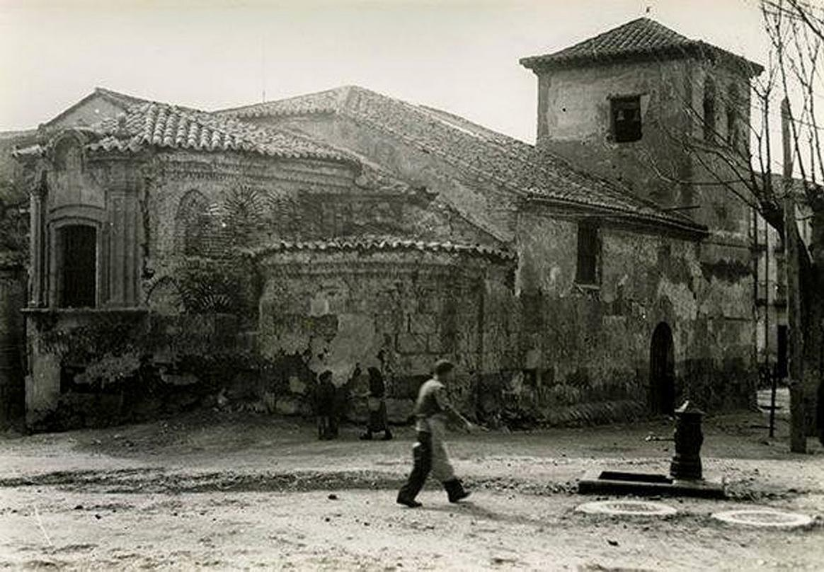 Fotografía de la iglesia de Santiago de Salamanca a inicios del siglo XX. De autor desconocido, en ella puede apreciarse la diferencia del templo de entonces con el actual tras la restauración de 1951-1965.